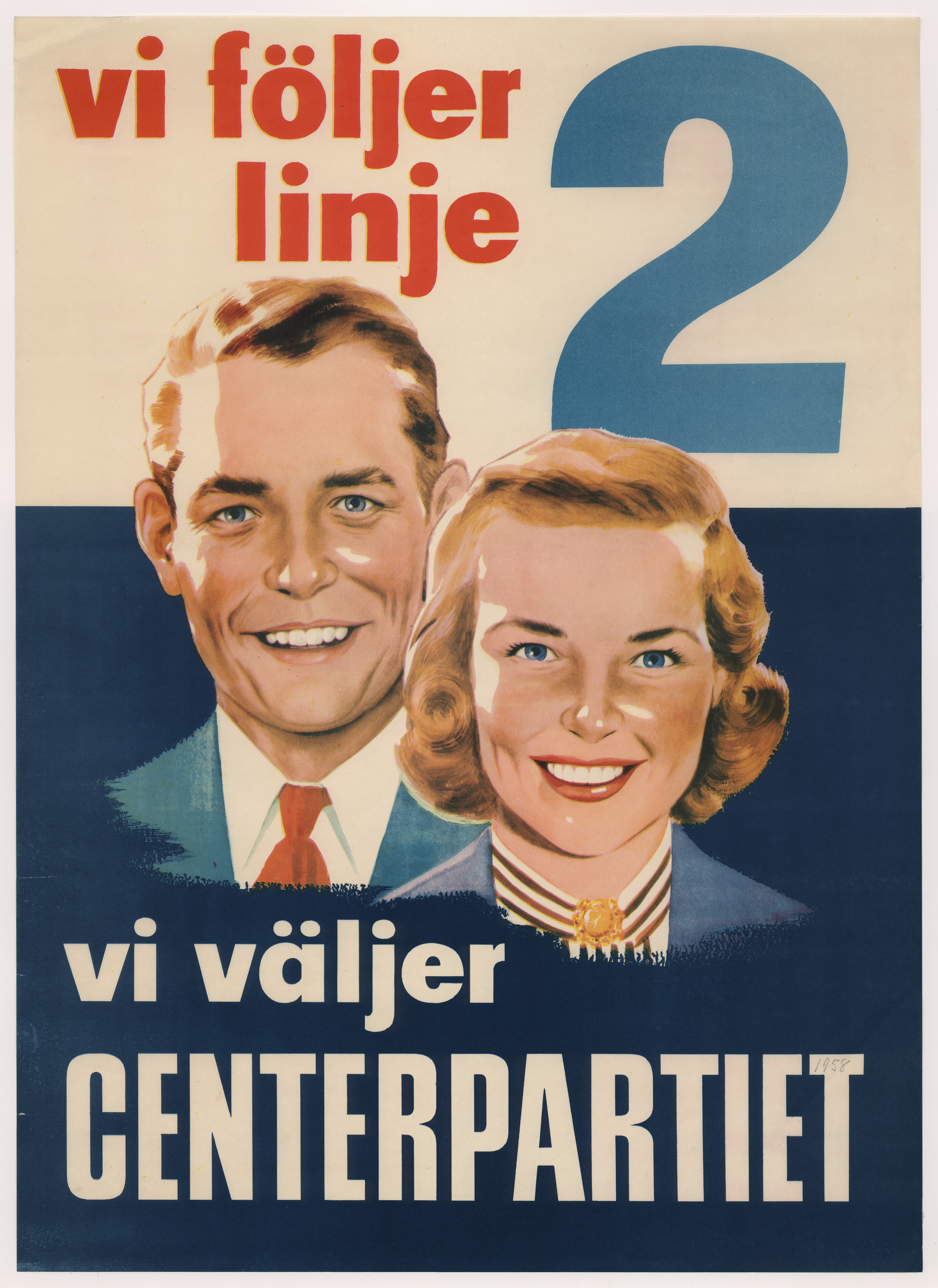 Centerpartiets valaffisch inför folkomröstningen om pensionssystemet 1957. "Vi följer linje 2, vi väljer Centerpartiet".